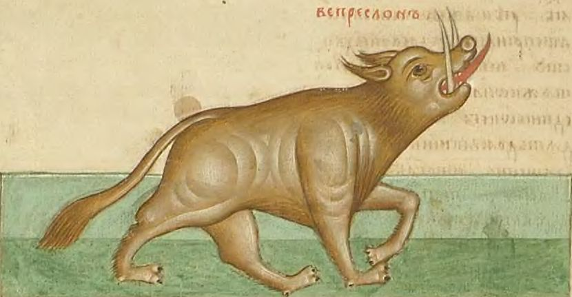 Вепреслон